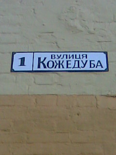 Вулиця Кожедуба в м. Шостка (табличка)